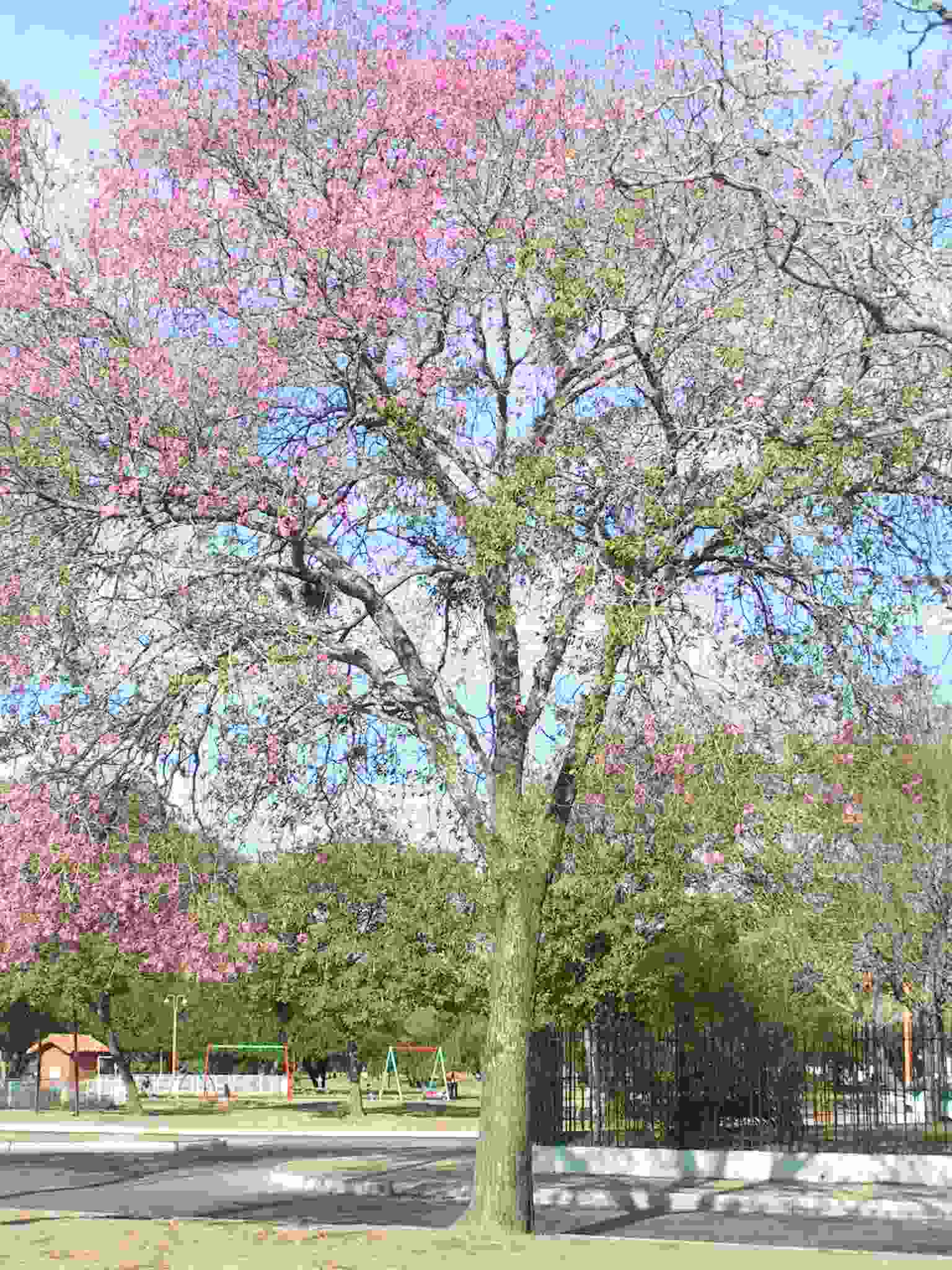 Lapacho rosado (Tabebuia impetiginosa)